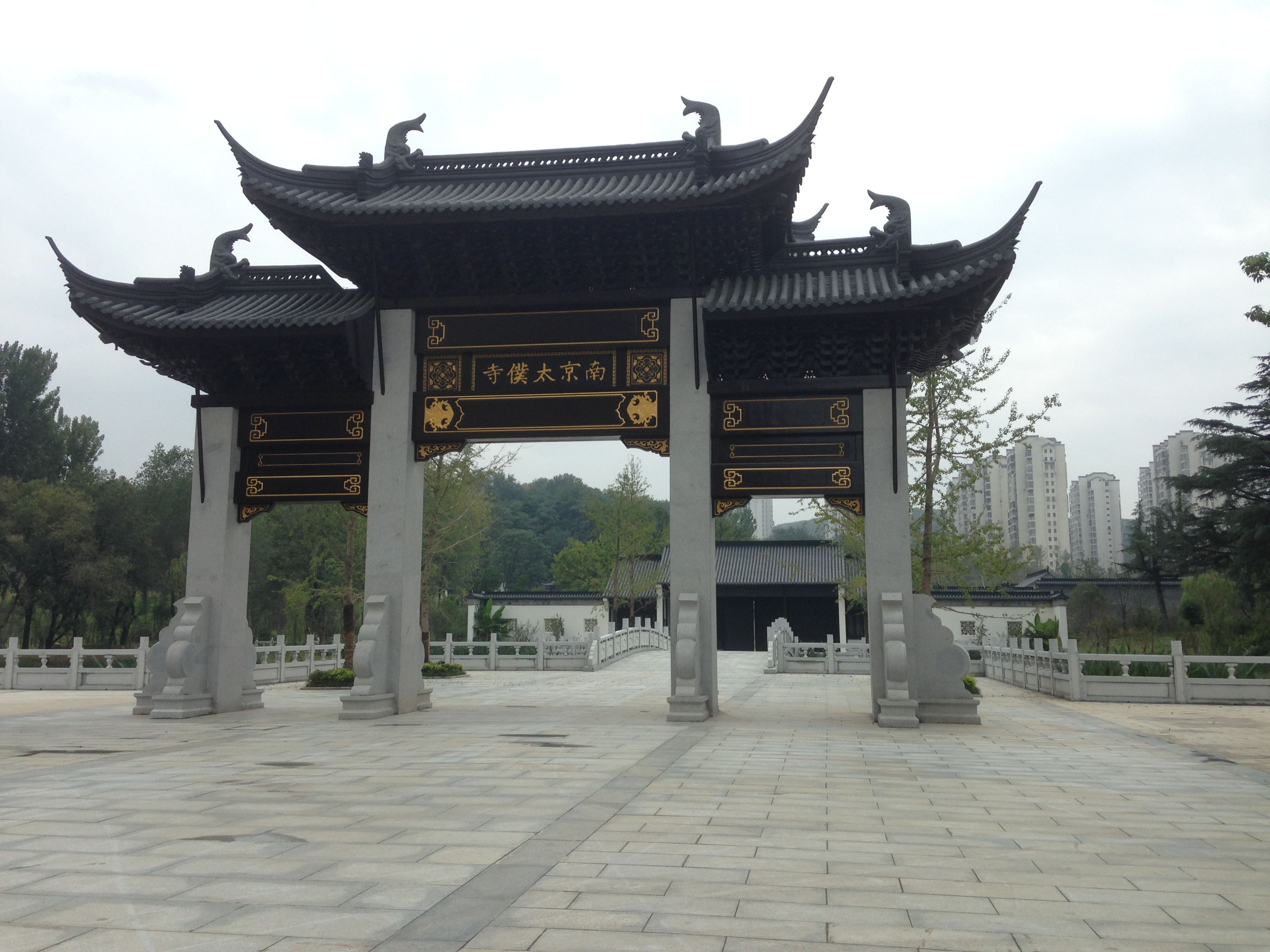 中文（中国大陆）: 南京太仆寺正门照片（用于滁州市文保条目集）